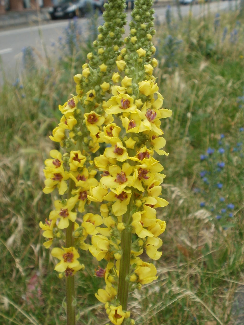 Schwarze Königskerze (Verbascum nigrum) in der Mainzer Straße (Saarbrücken)